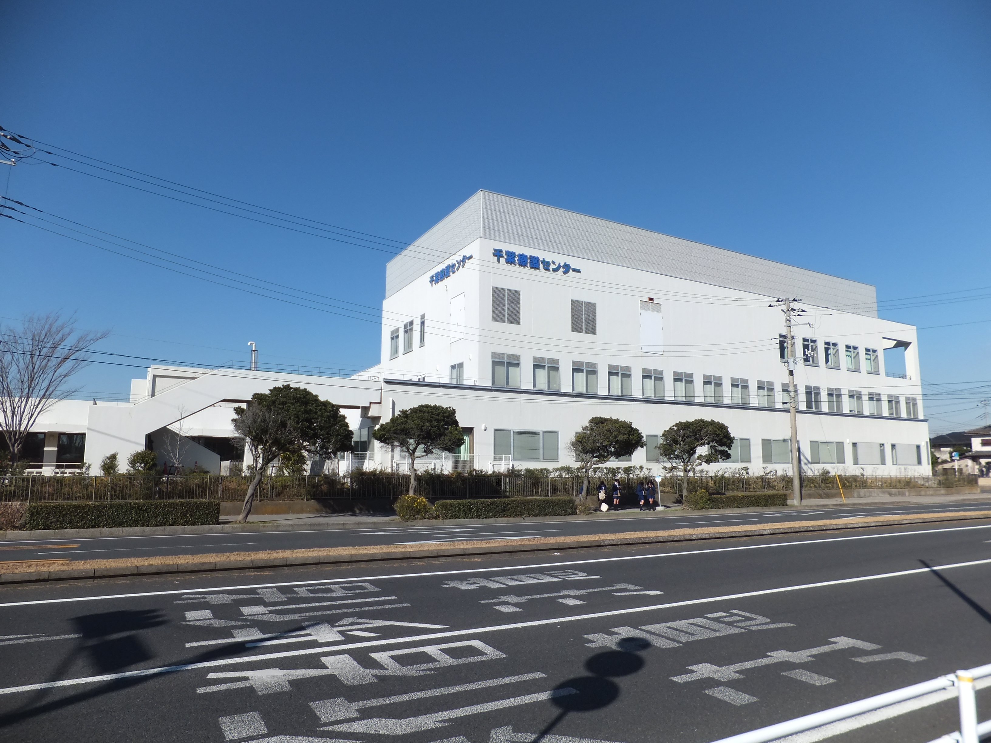 自動車事故対策機構（National agency for Automotive Safety & Victim's Aid; NASVA）千葉療護センター